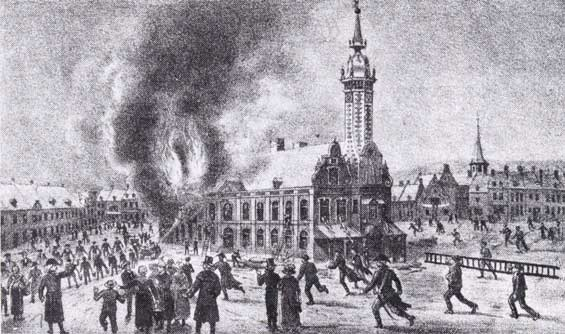 L'incendie de l'ancien Hôtel de Ville d'Hazebrouck en 1801